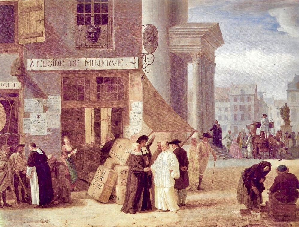 Léonard Defrance (1735–1805): A l’égide de Minerve. An der Wand der Buchhandlung das Toleranzedikt Josephs II. (1781). Öl auf Holz, 64 x 86 cm. Musée des Beaux-Arts, Dijon.